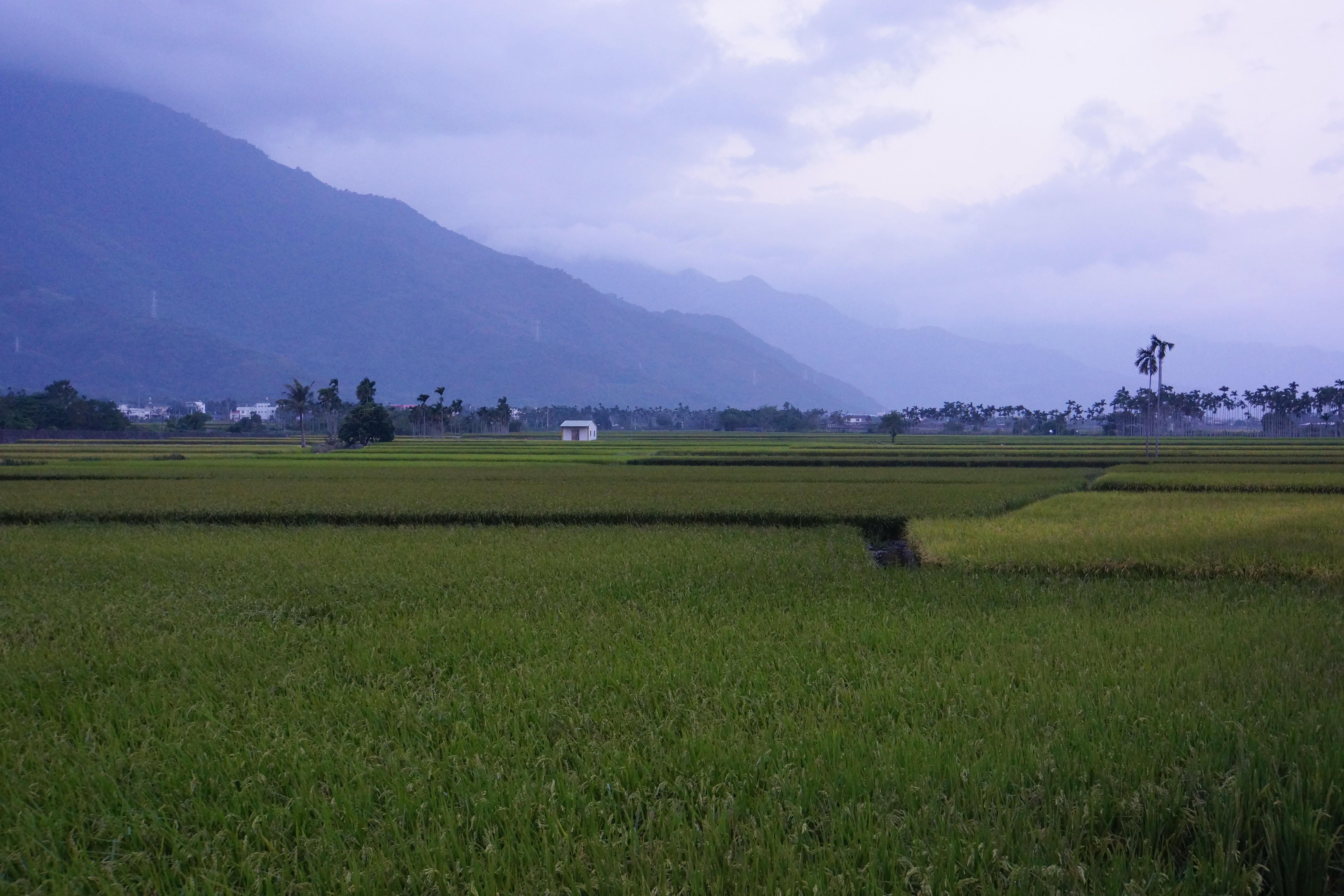 Guanshan 關山